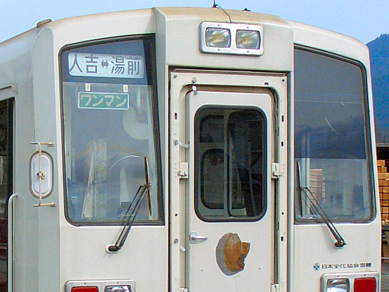 くま川鉄道ja:KT200形 KT-201 運転台付近の拡大 撮影者/著者/著作権保有者 : MK Products (本人がアップロード) 撮影日 : 2007/03/14 ワンマン運転用にアップロードした画像です。良い画像があれば別の画像に変えてください。